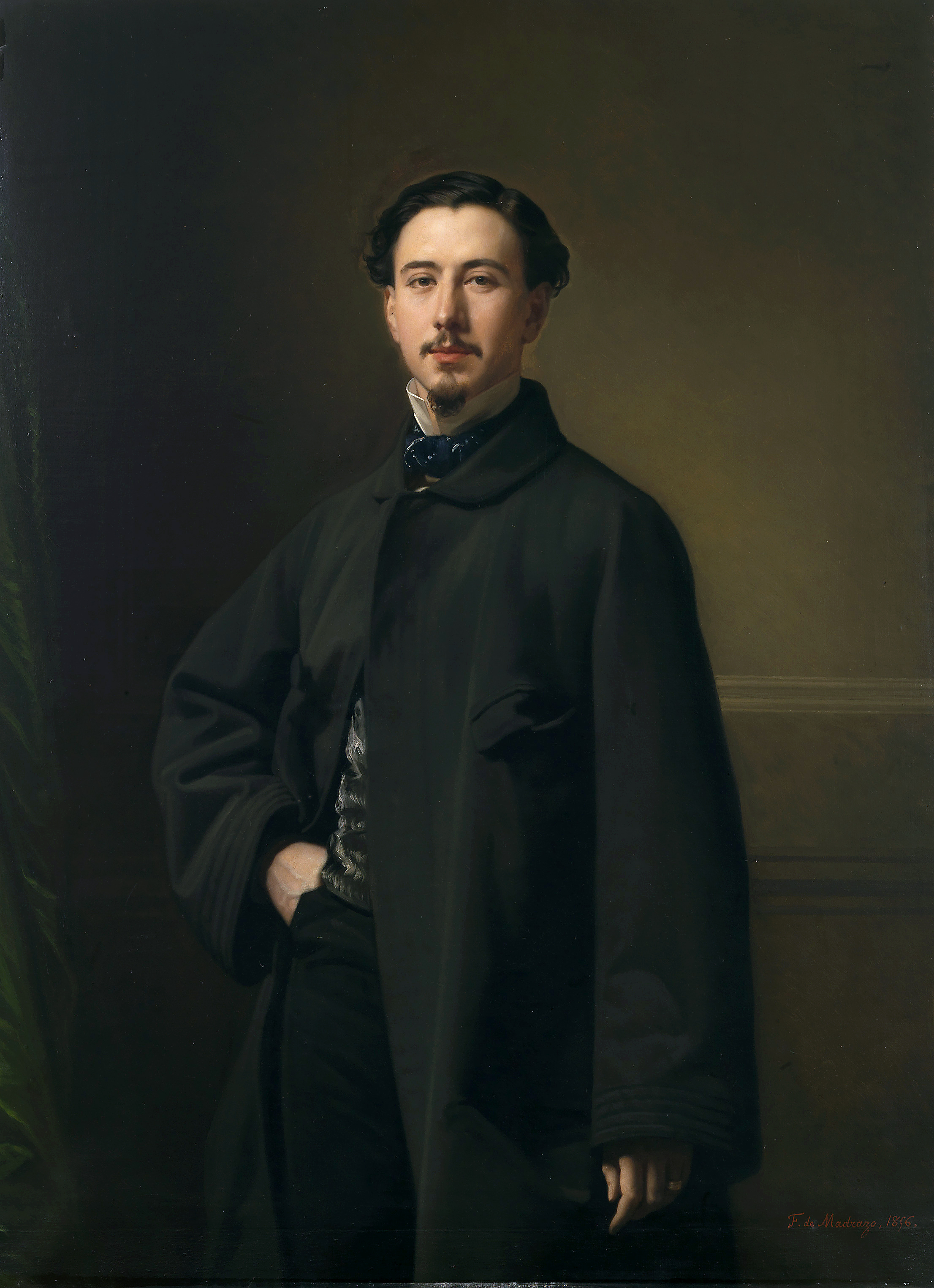 Retrato del banquero y político español Jaime Girona y Agrafel (1826-1907), primer conde de Eleta y caballero gran cruz de la Orden de Isabel la Católica.